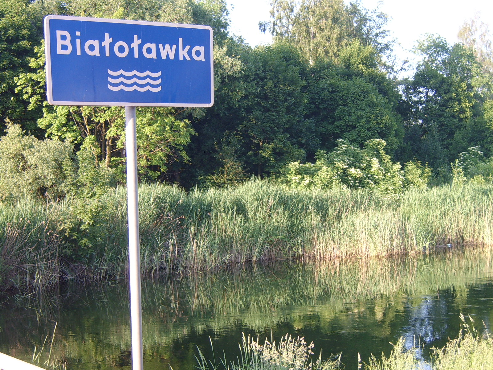 Tabliczka na mostku na trasie Orzysz — Pisz.